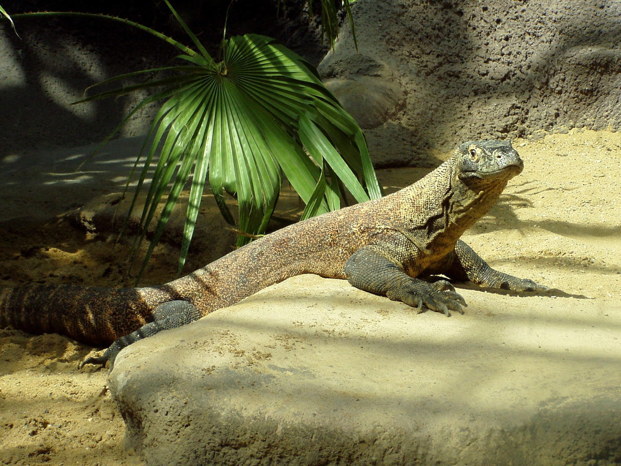 Varanus komodoensis (Prague Zoo)